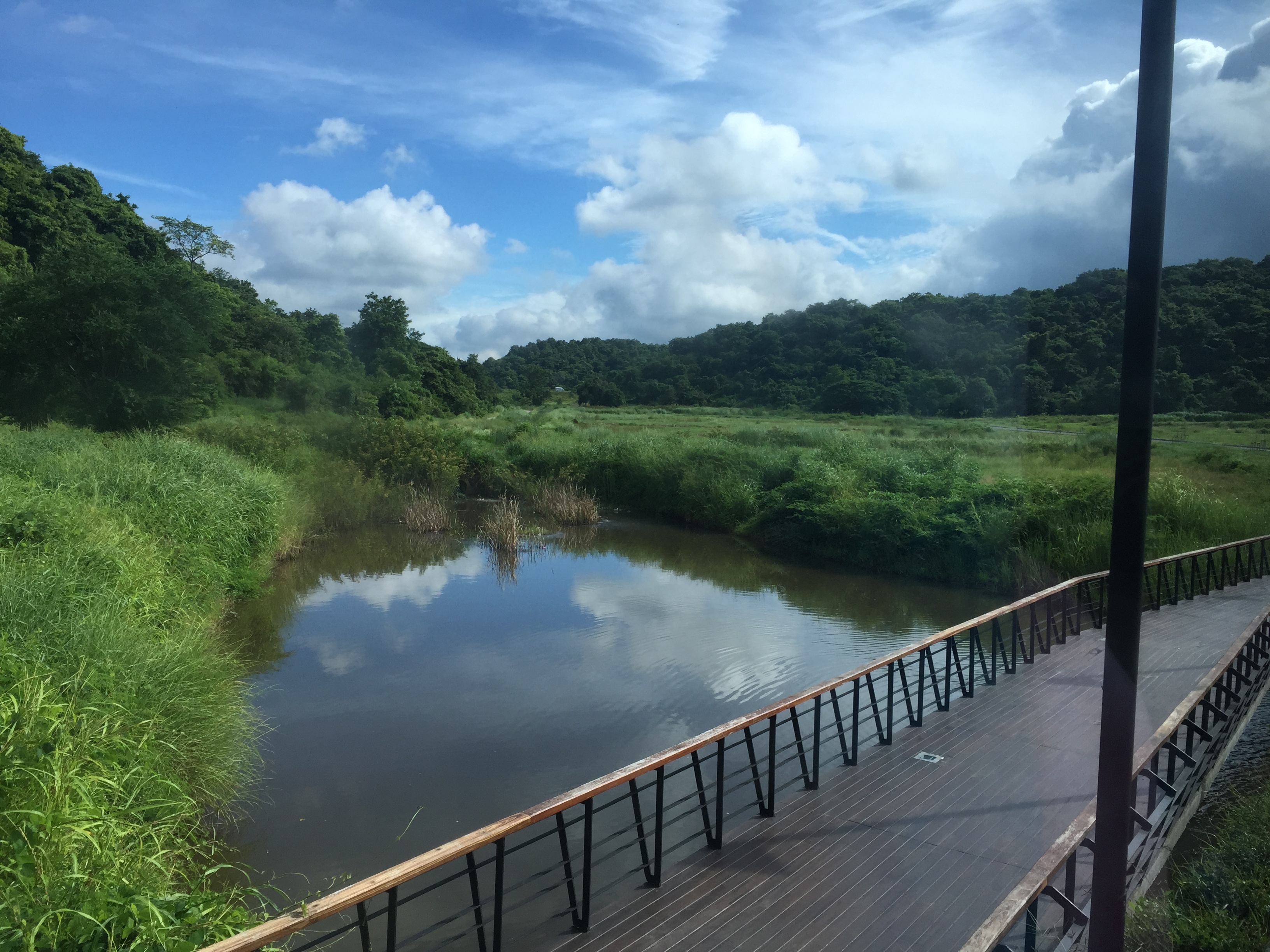 ลำธารในพื้นที่จุฬาลงกรณ์มหาวิทยาลัย ในจังหวัดสระบุรี